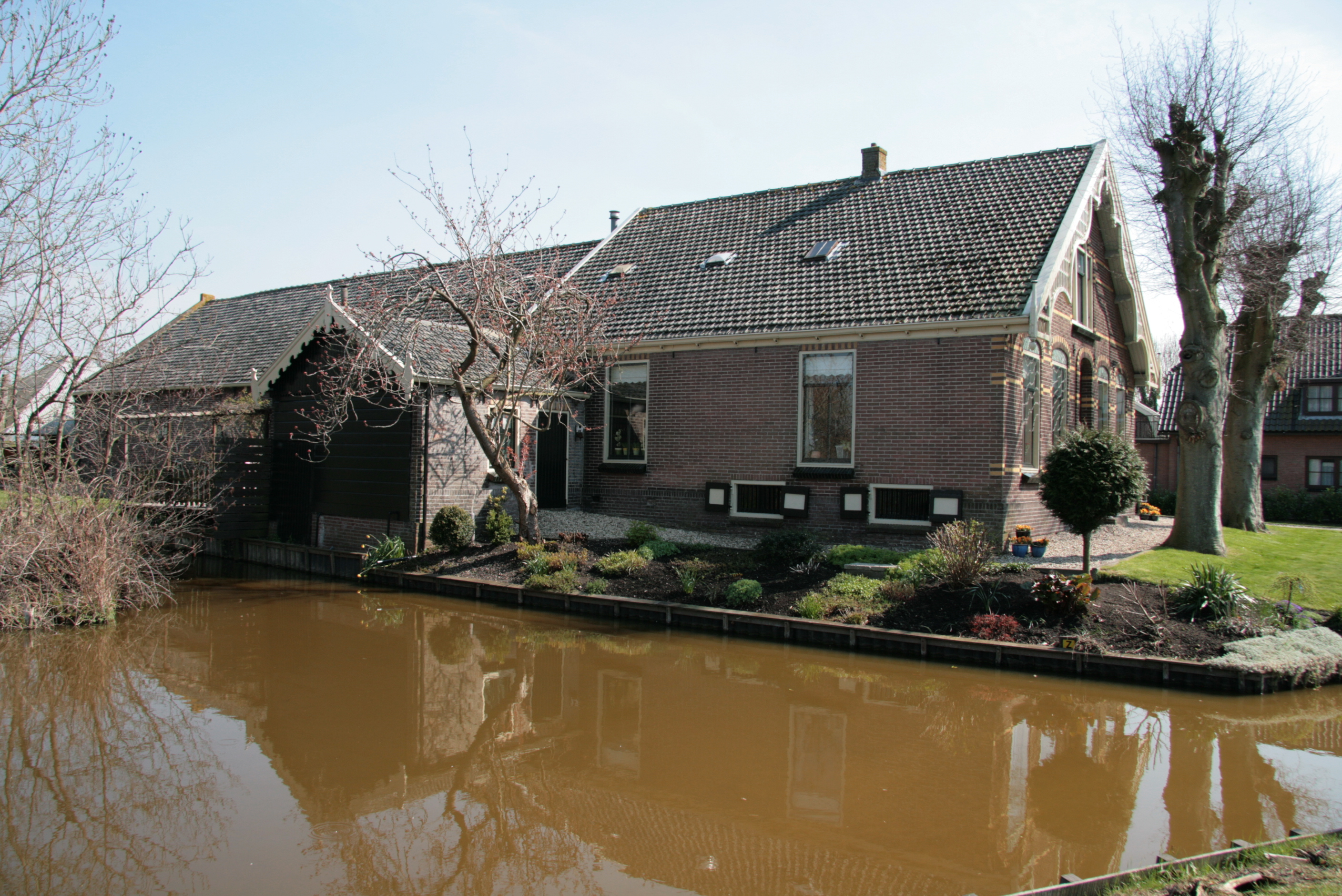 Landhuisboerderij met aan de waterkant een aangebouwd boenhok. Een boenhok had een werkstoep direct aan het water gelegen en kon met een luik worden afgesloten. Op de werkstoep werden de melkbussen en –emmers met helder slootwater schoongemaakt. Het boenhok had ook een huishoudelijke functie. Meestal stond er in het boenhok een waterfornuis voor het koken van de was en/of het koken van aardappels voor de varkens. Ook voor de kaasmakerij was warm water nodig.